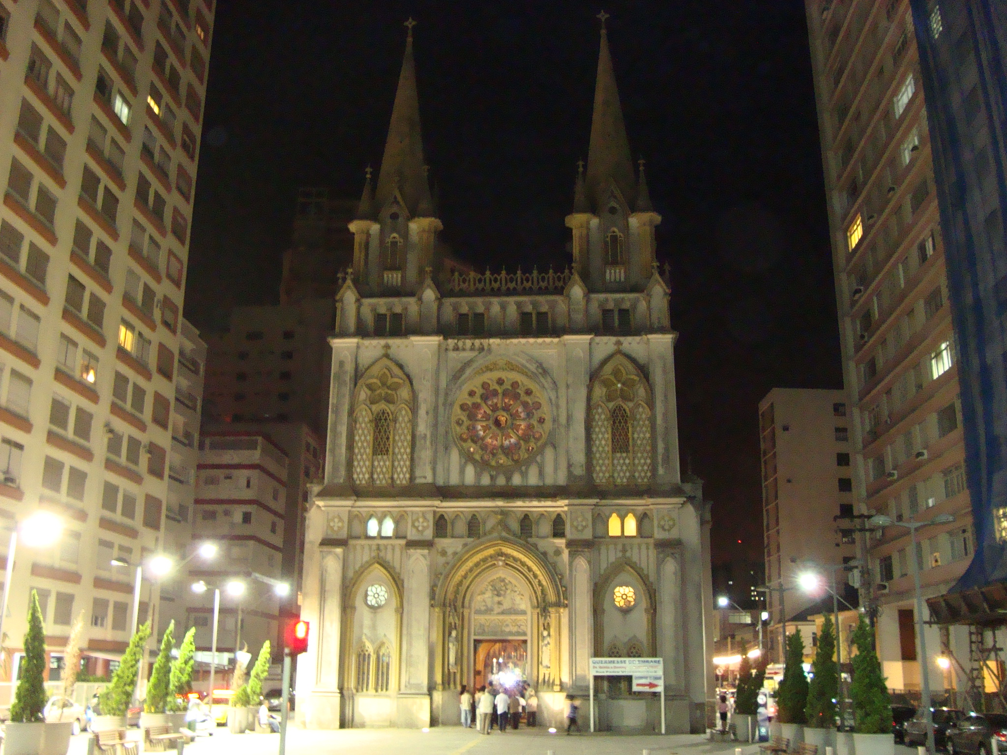 Igreja do Embaré